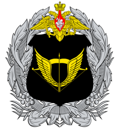 Герб Сил специальных операций России